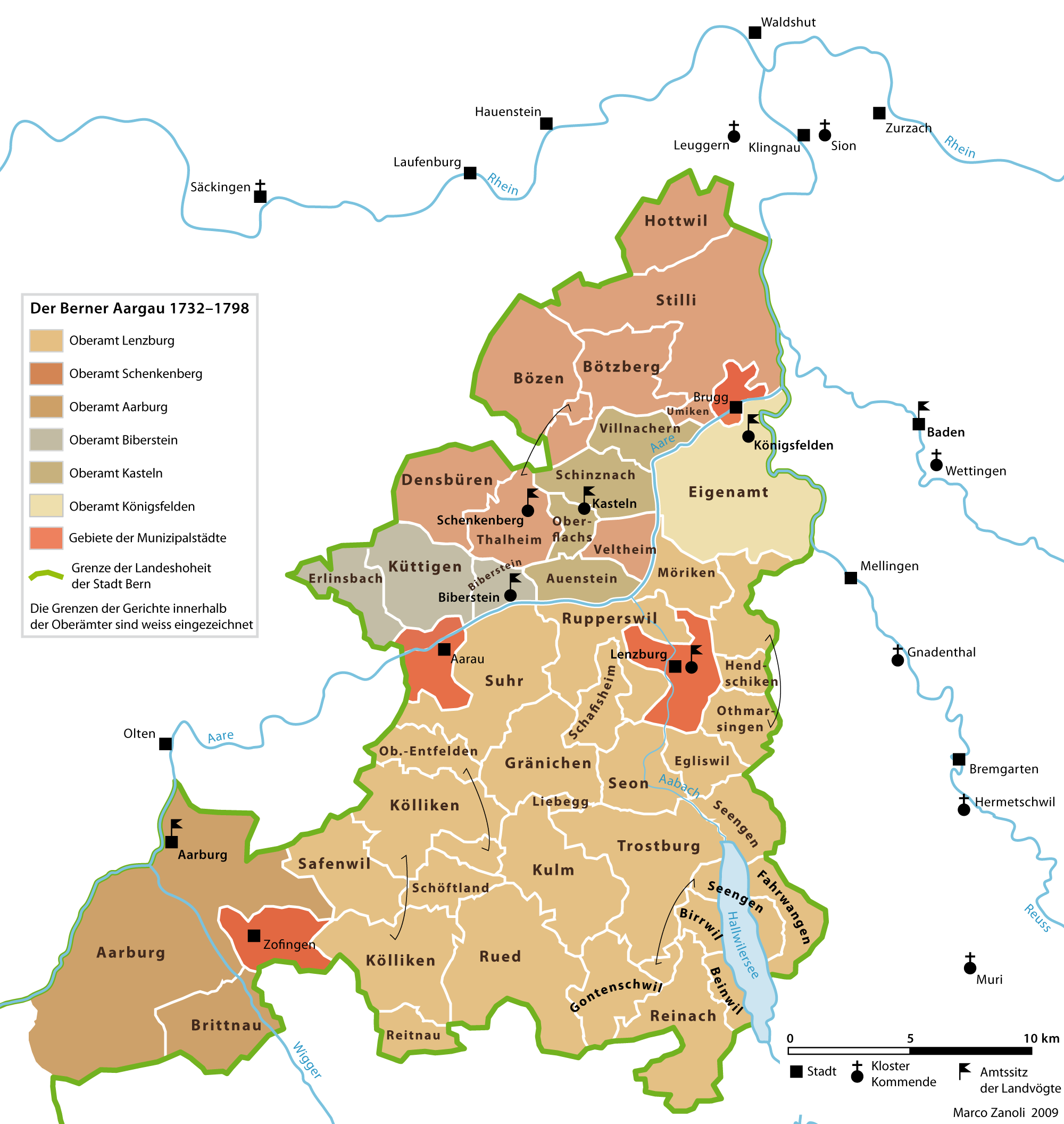 Der Berner Aargau (Unter-Aargau) 1732 (Einrichtung des Oberamts Kasteln) bis 1798 (Helvetische Revolution).